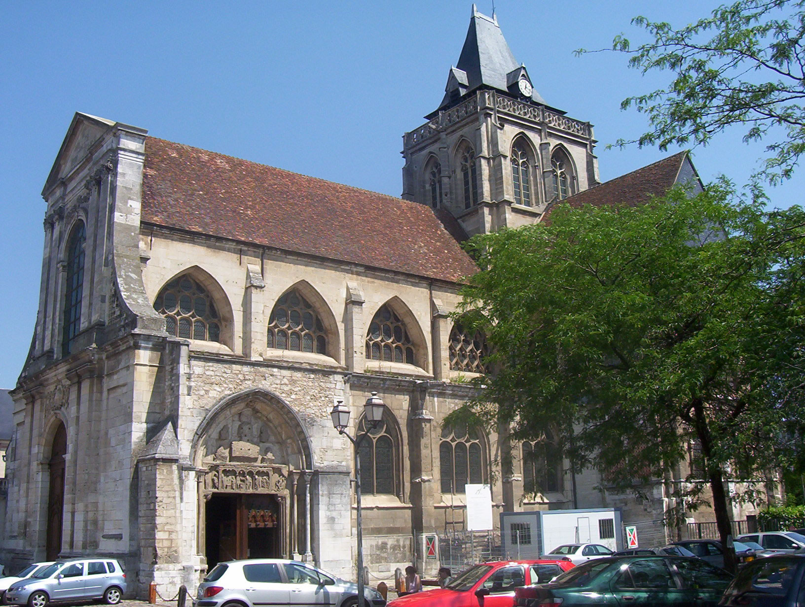 L'église Saint-Taurin, à Évreux - France - La place Saint-Taurin est un site classé en 1937, qui a survécu à la Seconde Guerre Mondiale.